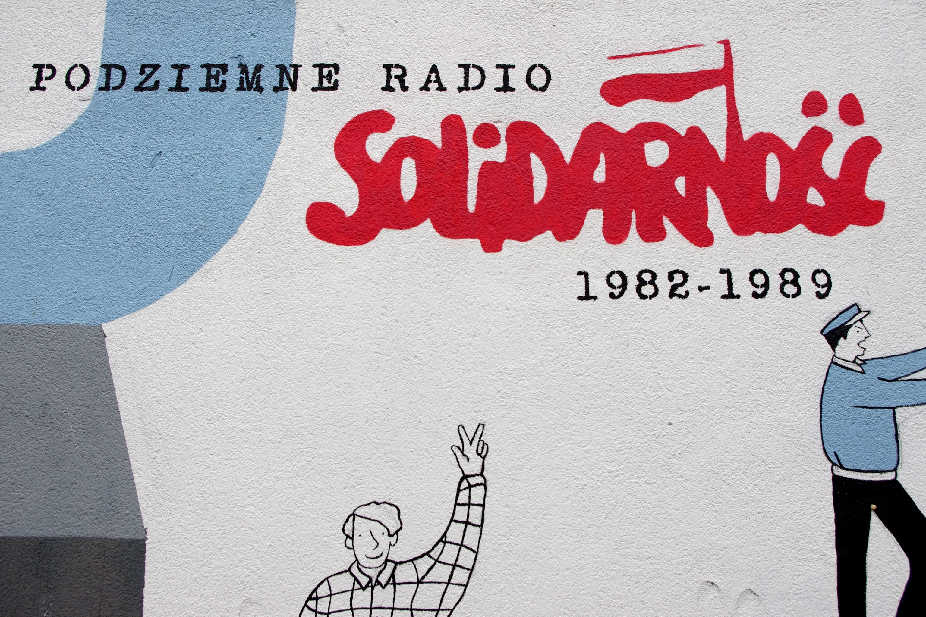 Mural upamiętniający podziemne Radio Solidarność na budynku przy ul. Grójeckiej 19/25 w Warszawie